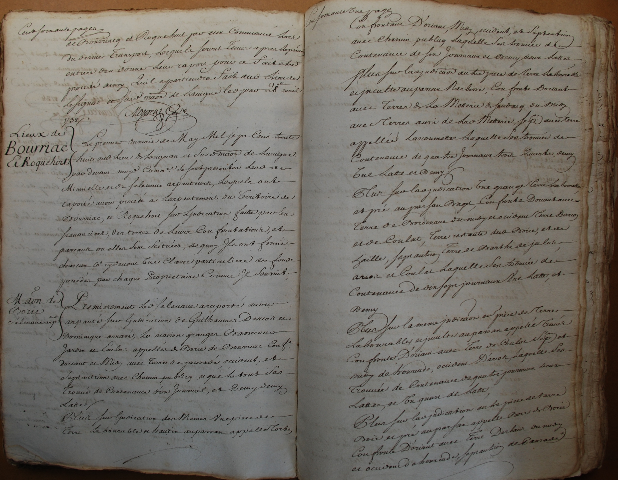 Photographie d'un extrait de l'arpentement de la Baronnie des Angles réalisé en 1736/1741, à la demande du marquis Roux de Gaubert de Courbons, baron des Angles, pour le relèvement de ses droits seigneuriaux dus par les tenanciers de la Baronnie des Angles. Le document photographié est le début du registre concernant les lieux de Bourréac et Récahorts (hameau de Bourréac). Ce document est tiré du fonds d'archives numéroté 4J43 des Archives départementales de Pau (Pyrénées Atlantiques).